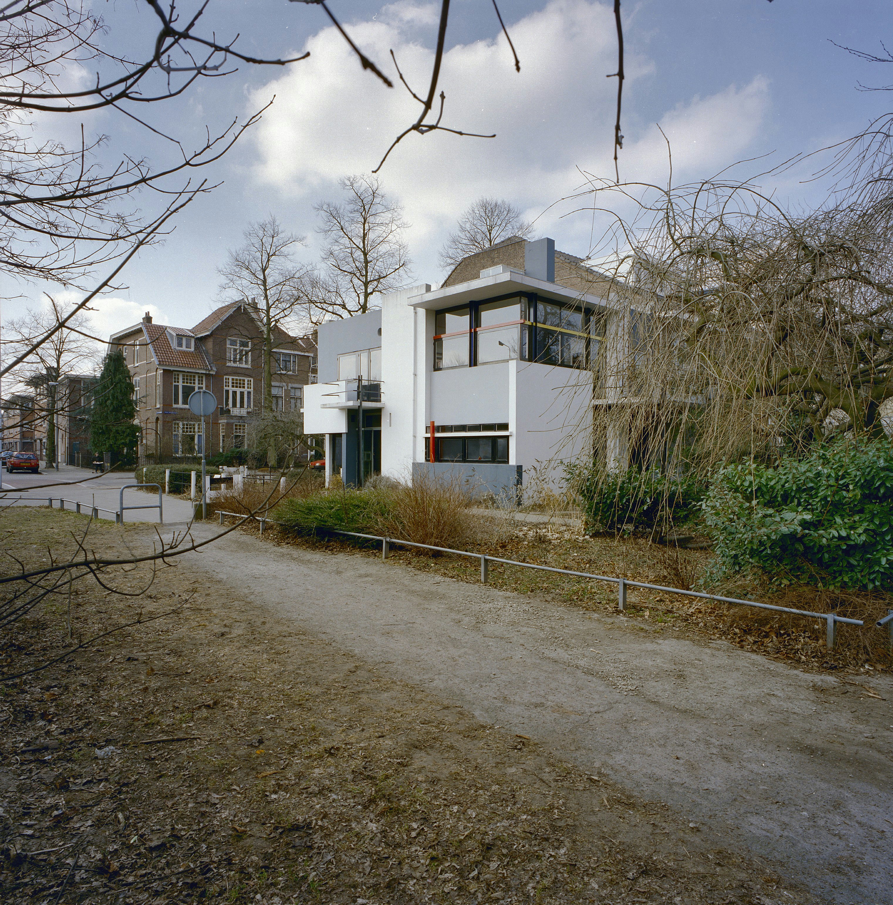 Rietveld-Schröderhuis: Exterieur overzicht zuidoost- en noordoostgevel